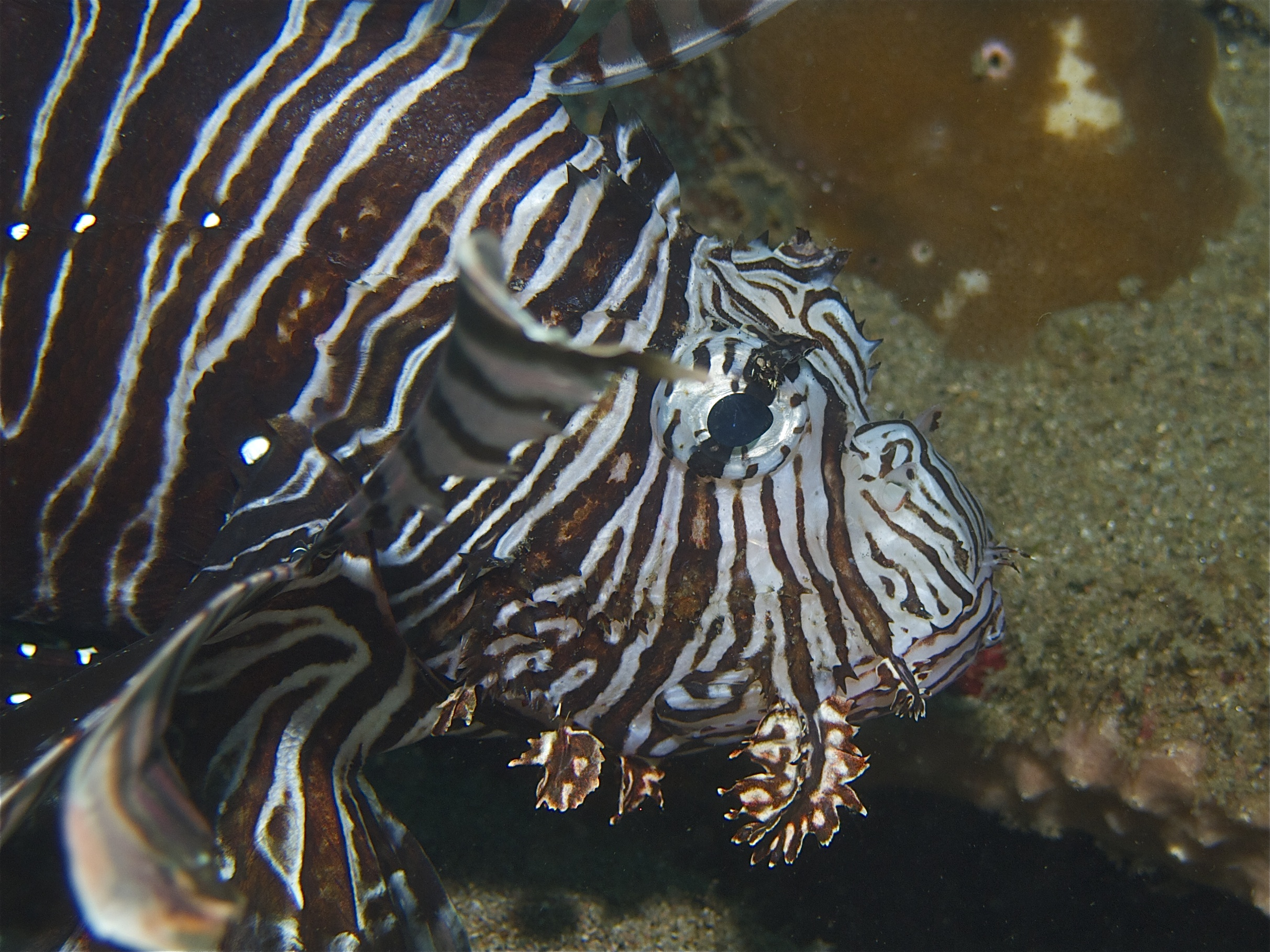 Likely Pterois volitans.